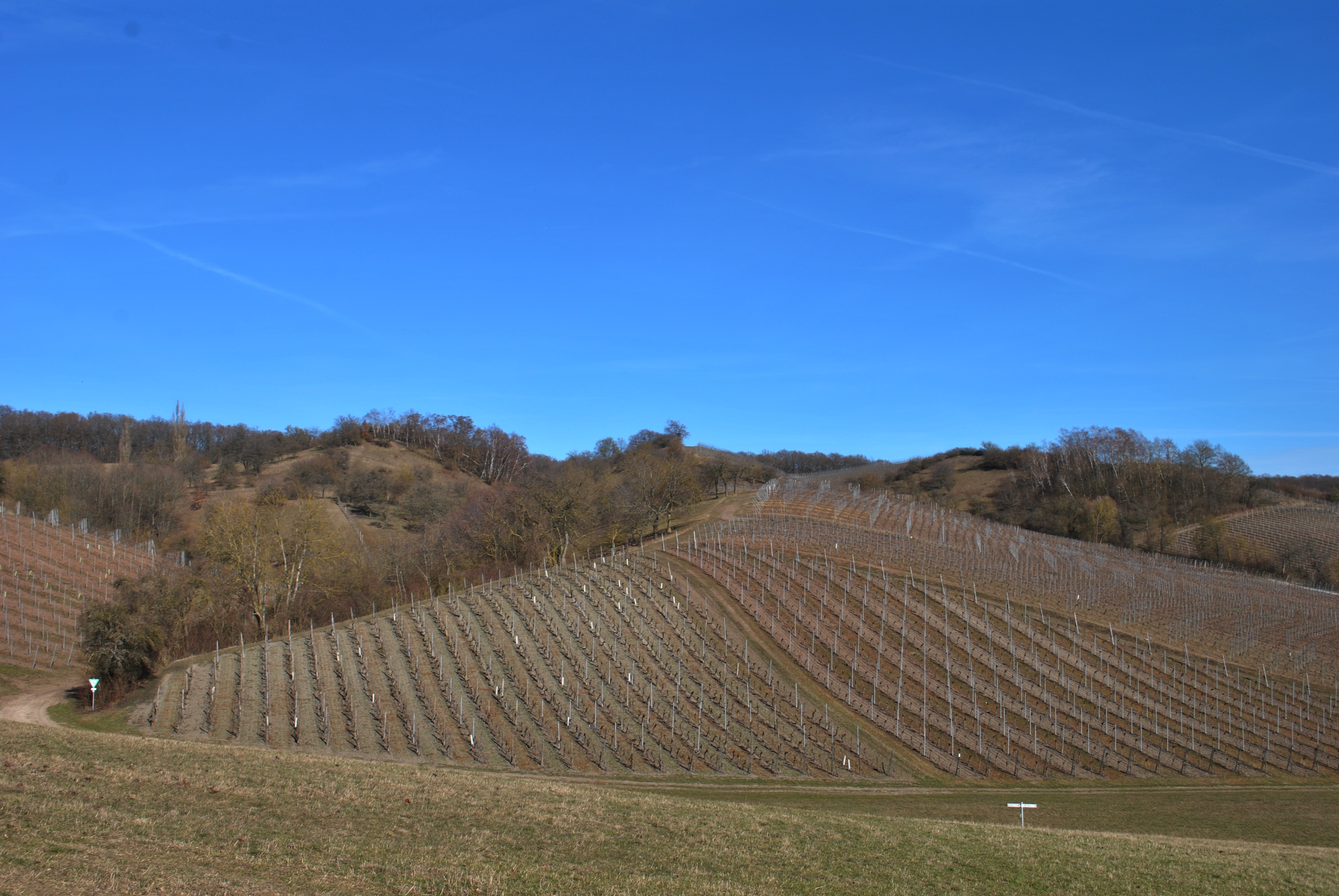 Naturschutzgebiet Schloßberg bei Markt Einersheim, komplex aufgebautes Offenlandgebiet